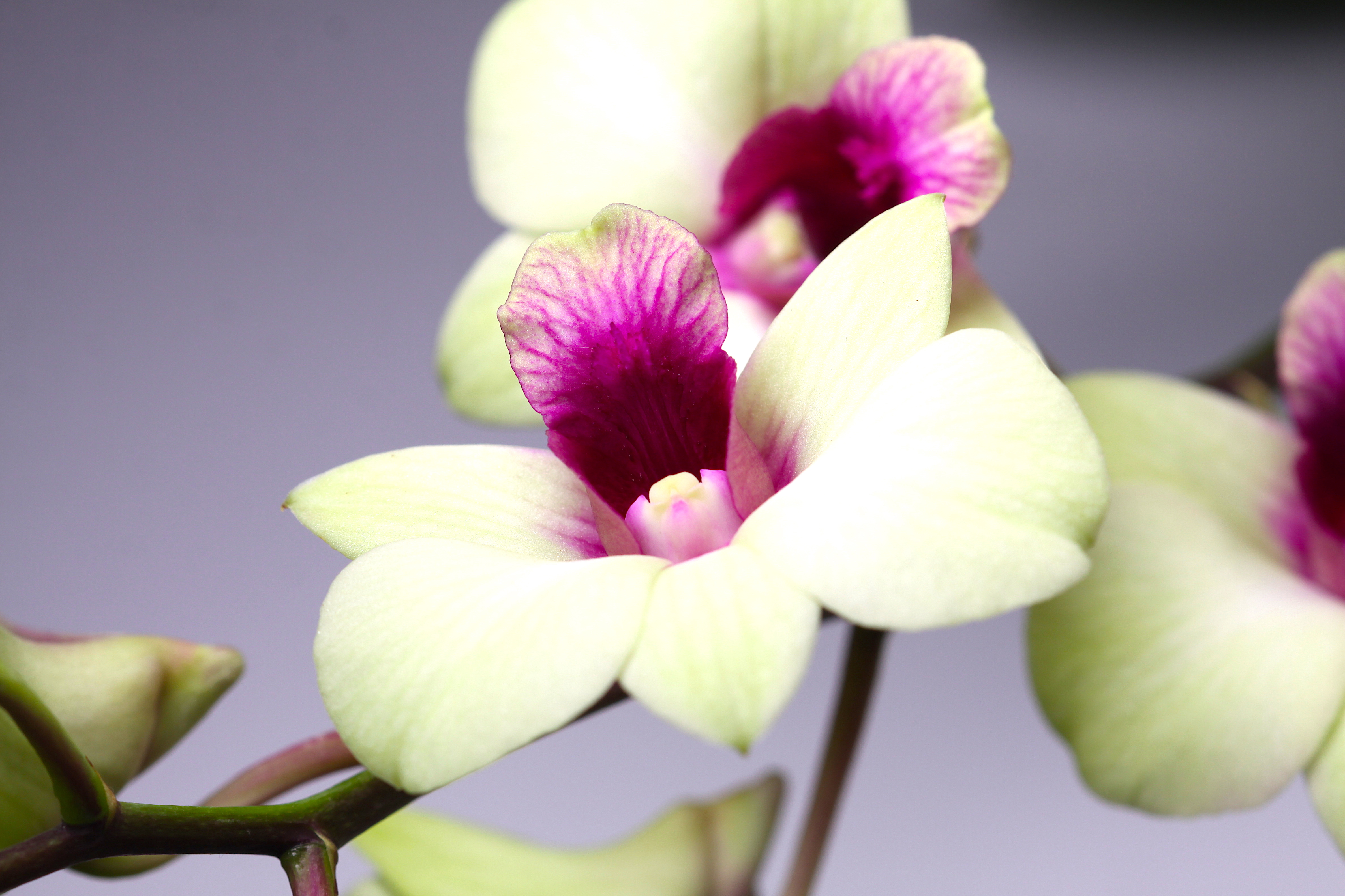 ดอกกล้วยไม้ ที่ระลึกจากงานพระราชทานเพลิงศพ ศาสตราจารย์ ระพี สาคริก " บิดาแห่งกล้วยไม้ไทย "